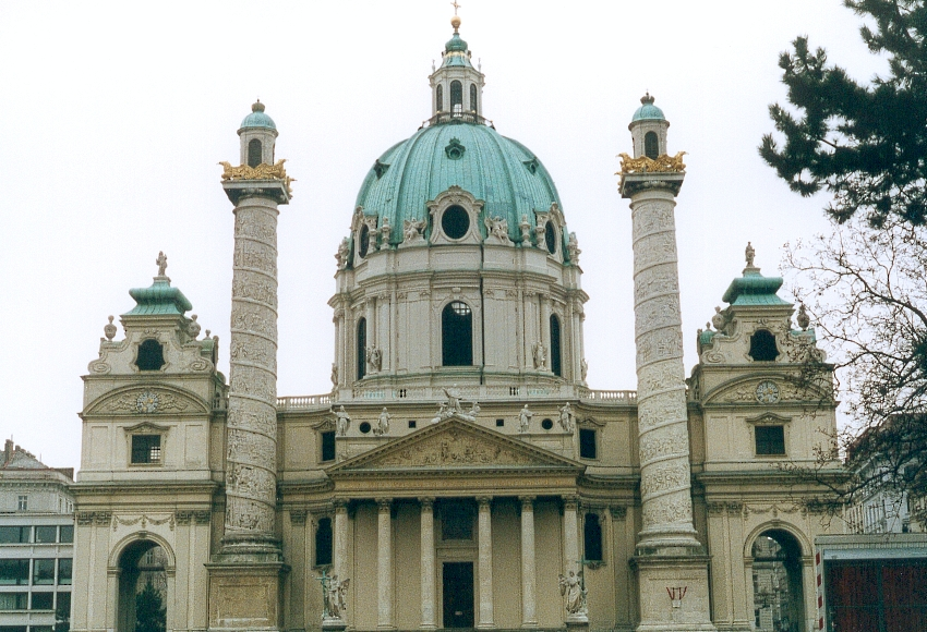 Copyright : Candiotti / FC Georgio Sujet : église StCharles Boromée Lieu : Vienne, Autriche Date : Mars 1997